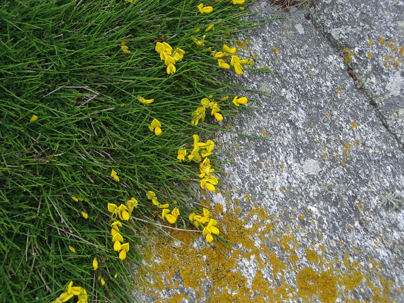 Cytisus scoparius subsp. maritimus, forme prostrée, Cap Sizun, Bretagne, France